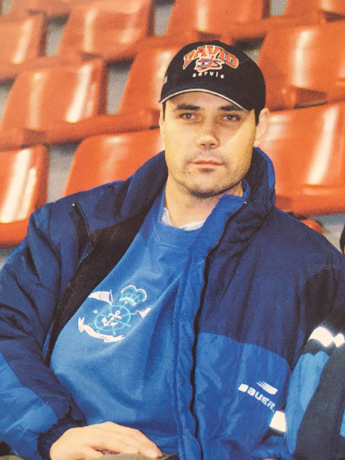 Rozhovor s Petrem Vaculíkem o hokejové kariéře a životě po hokeji.